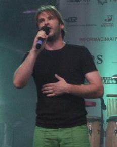 Marijonas Mikutavičius